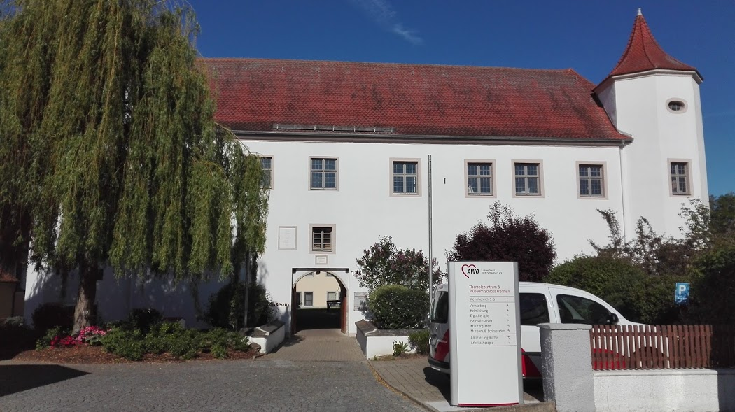 Schloss Cronheim, Ostflügel mit Tor